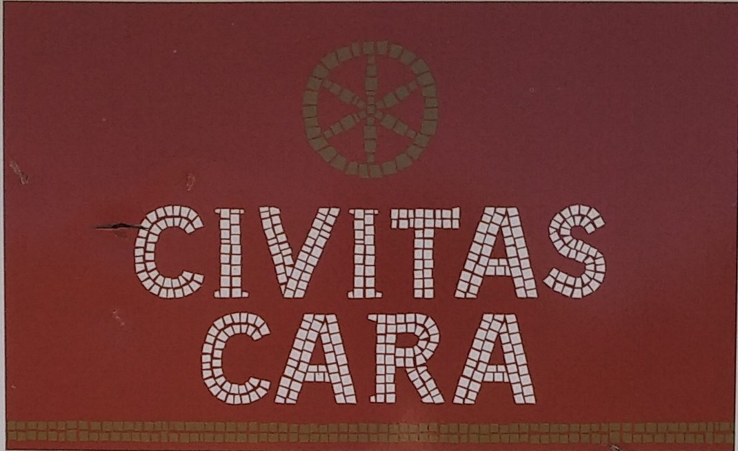 Indicar a la entrada del yacimiento